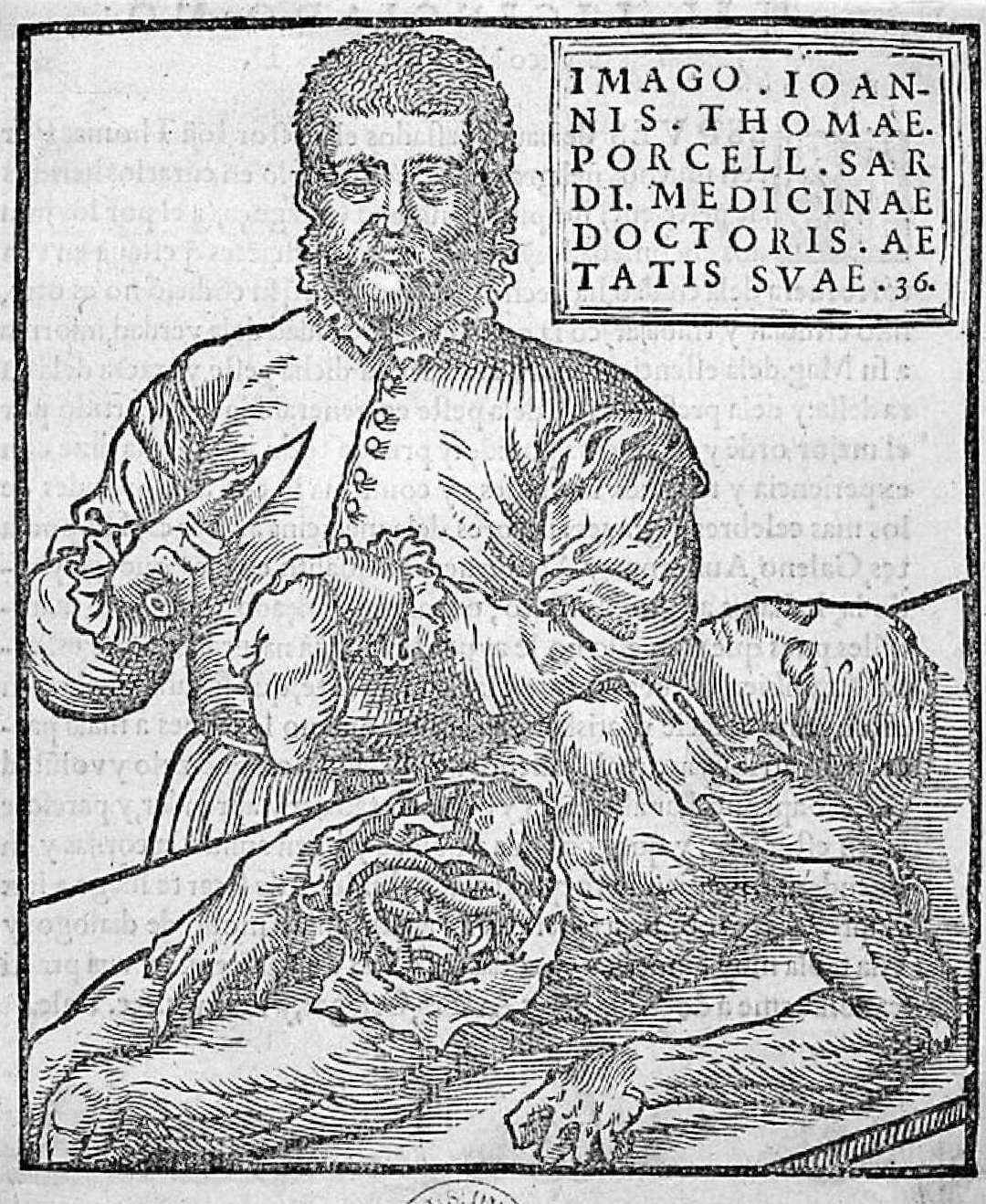 Retrato de Juan Tomás Porcell a los 36 años de edad, xilografía. Ilustración de "Información y curación de la peste de Zaragoza", Zaragoza, 1565. Biblioteca Nacional de España.